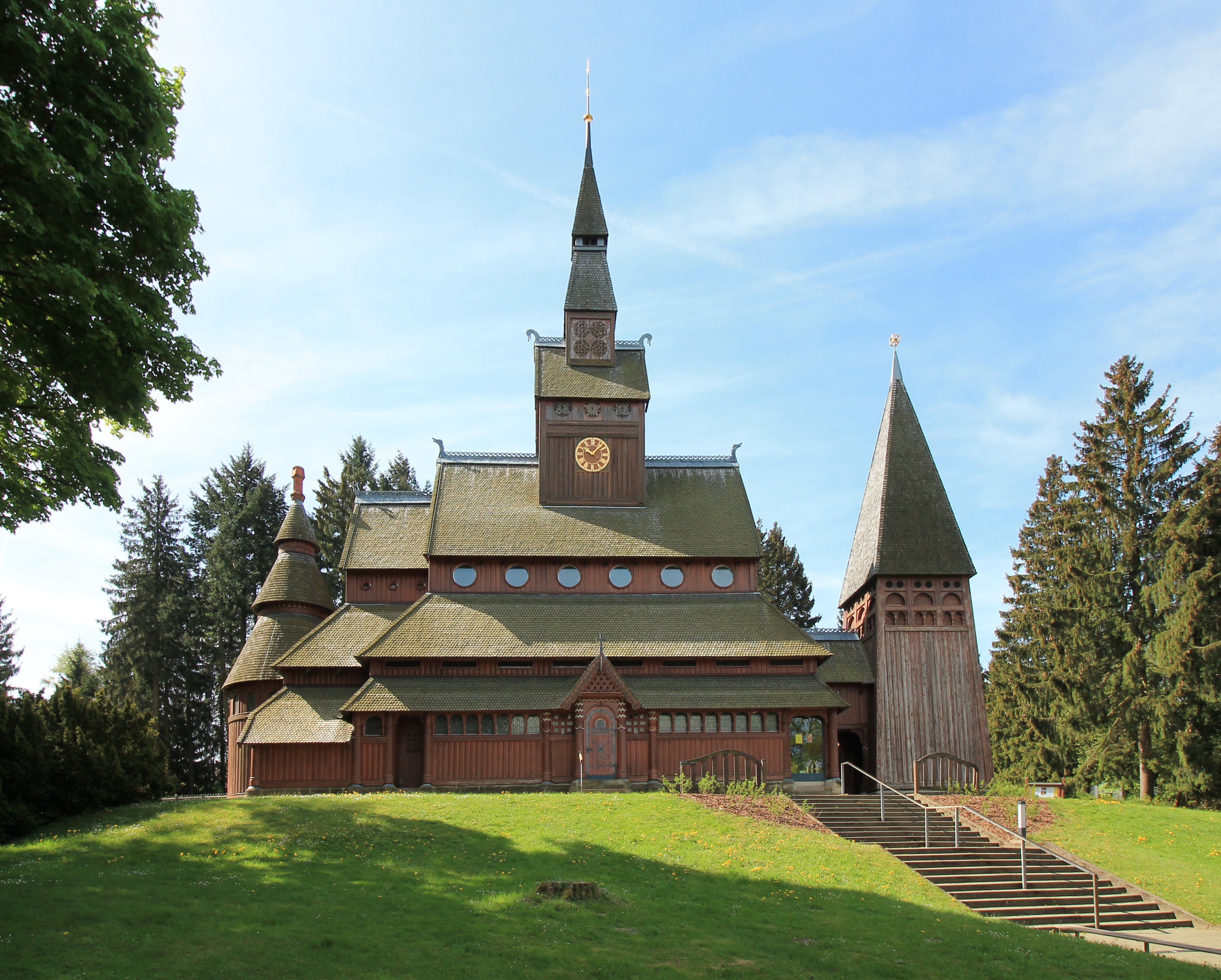 Gustav-Adolf-Stabkirche in Hahnenklee, Blick nach Süden. Hahnenklee-Bockswiese, Niederschsen, Deutschland.